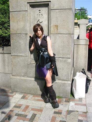 Chica "Lolita Gótica" en Harajuku, Tokio